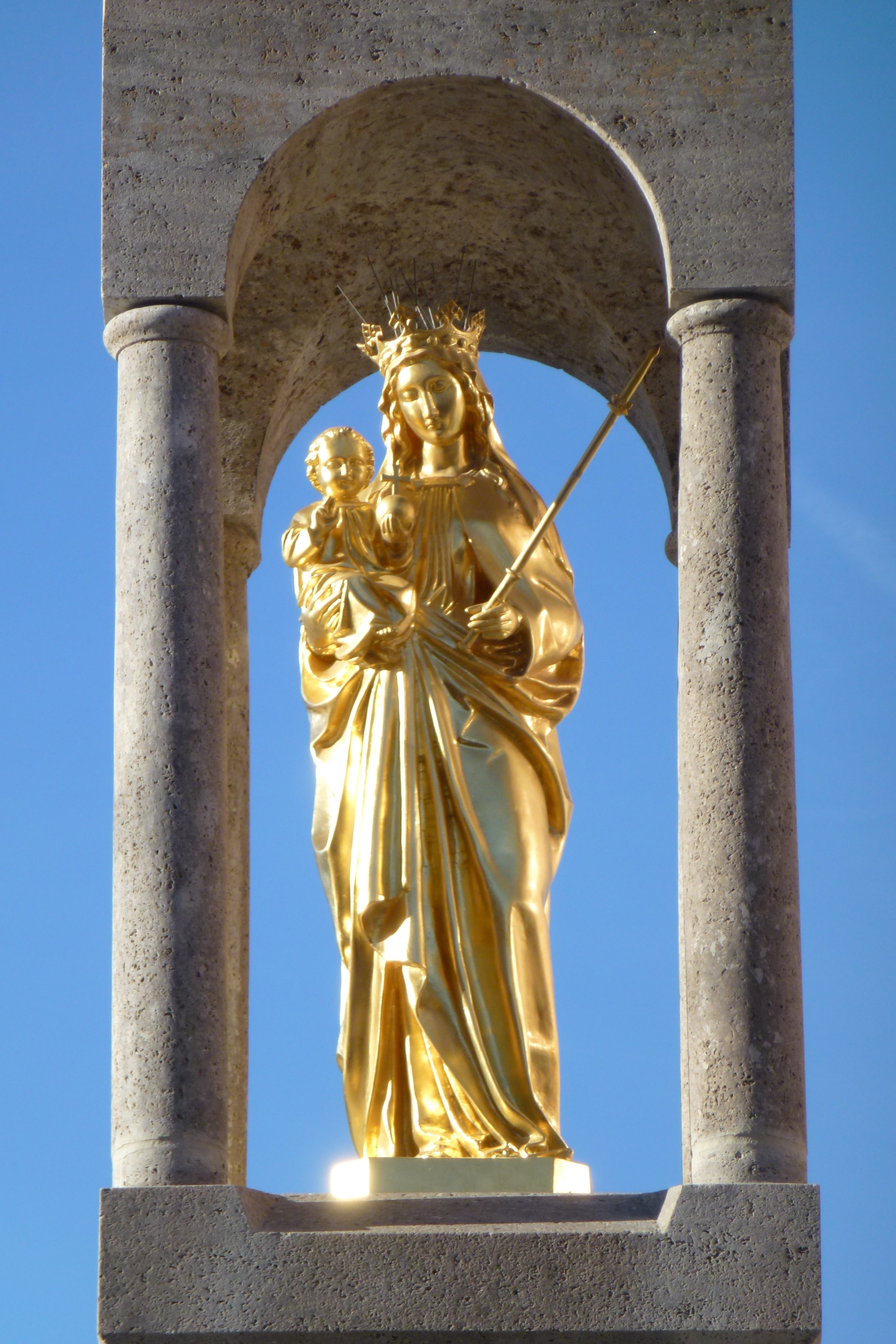 Vergoldete Marienfigur der Pasinger Mariensäule